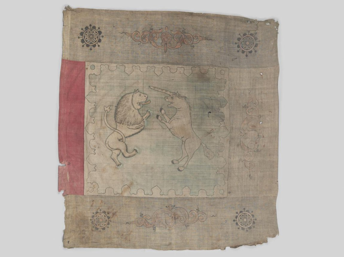 Знамя Ермака с изображением символов льва и единорога, было с ним при покорении Сибири (хранится в Государственной Оружейной палате)